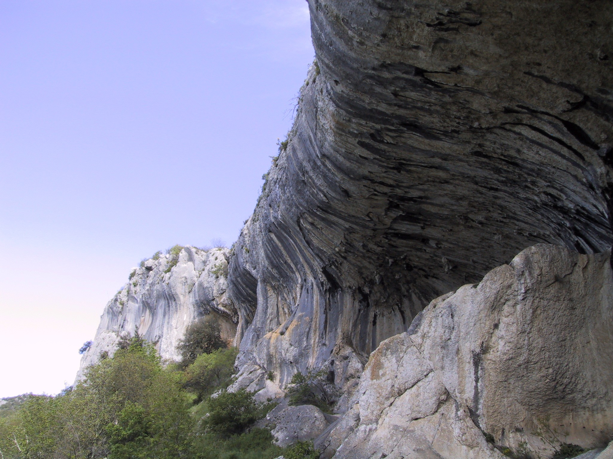 Spodmoli (Ušesa Istre) pri Sočergi